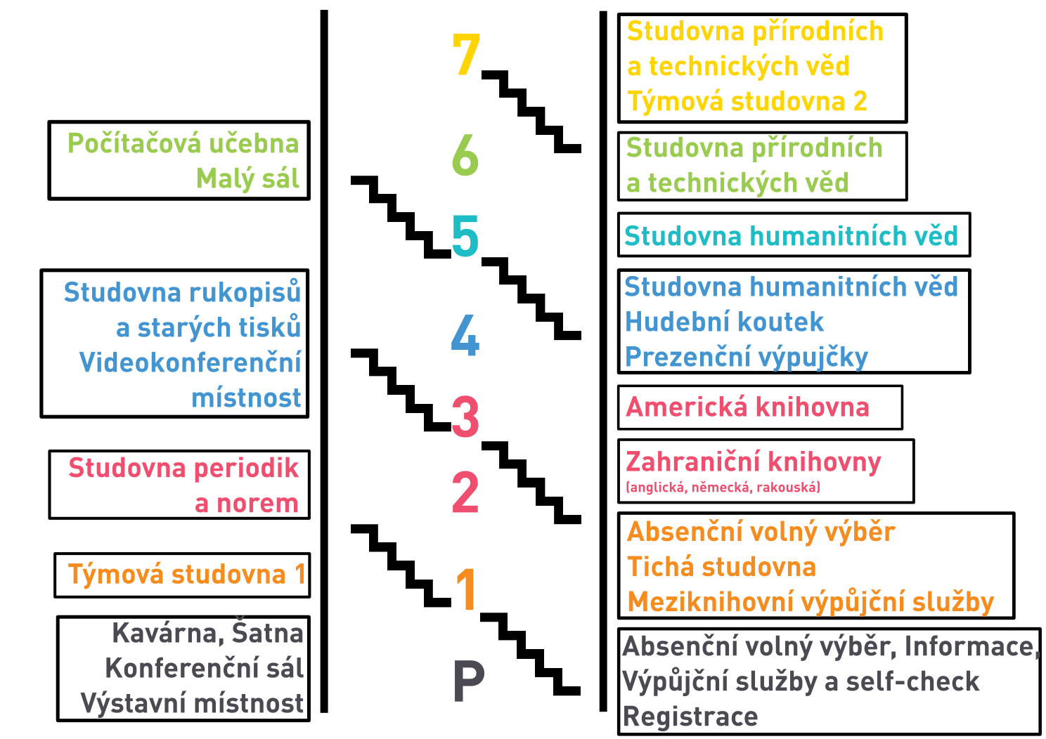 Orientace v knihovně.